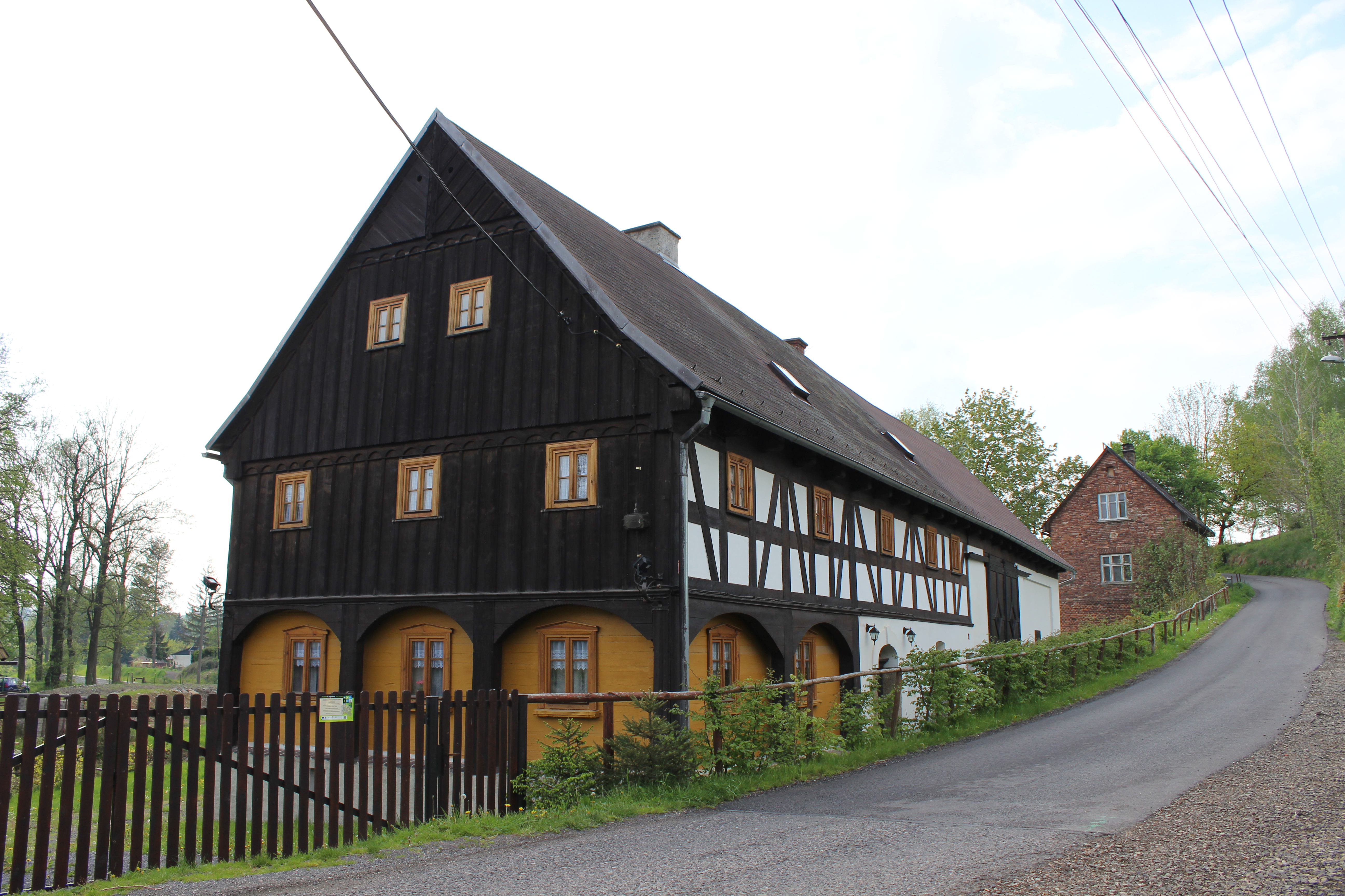 Raspenavské Muzeum v podstávkovém domě (v objektu čp. 25). Pohled na objekt od jihovýchodu.